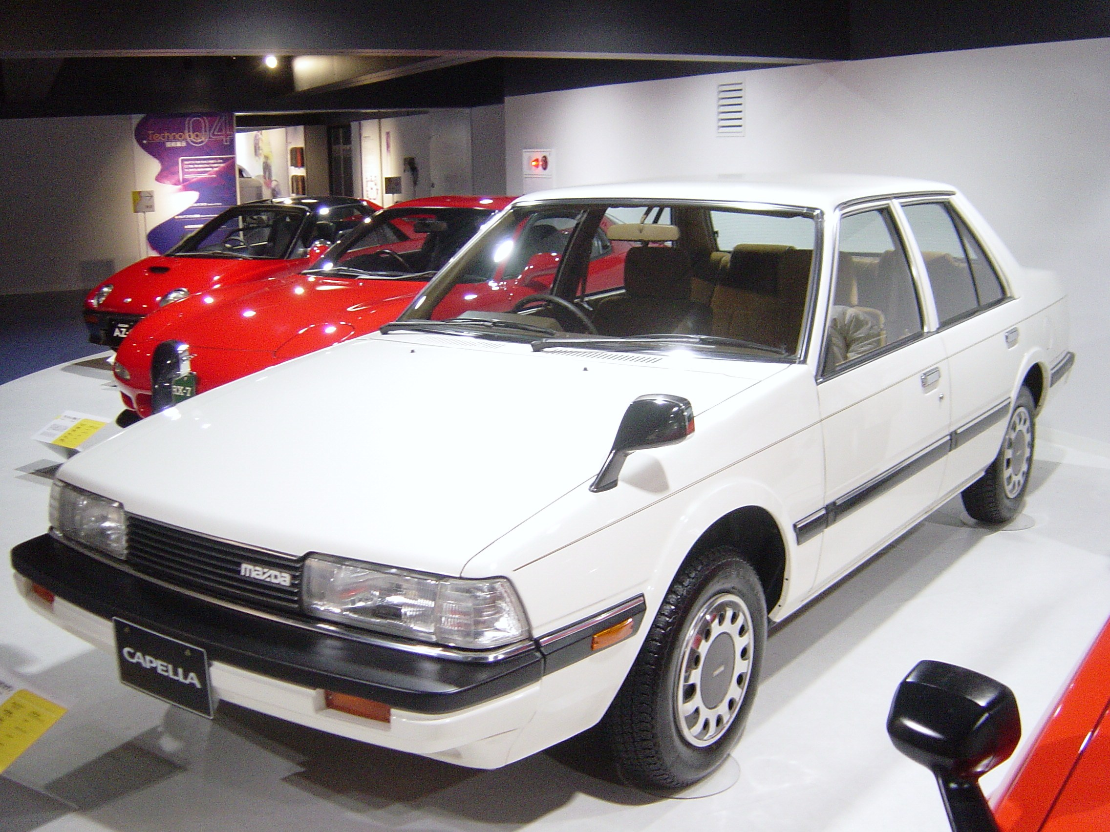 Mazda capella(マツダ・カペラ),Mazda Museum